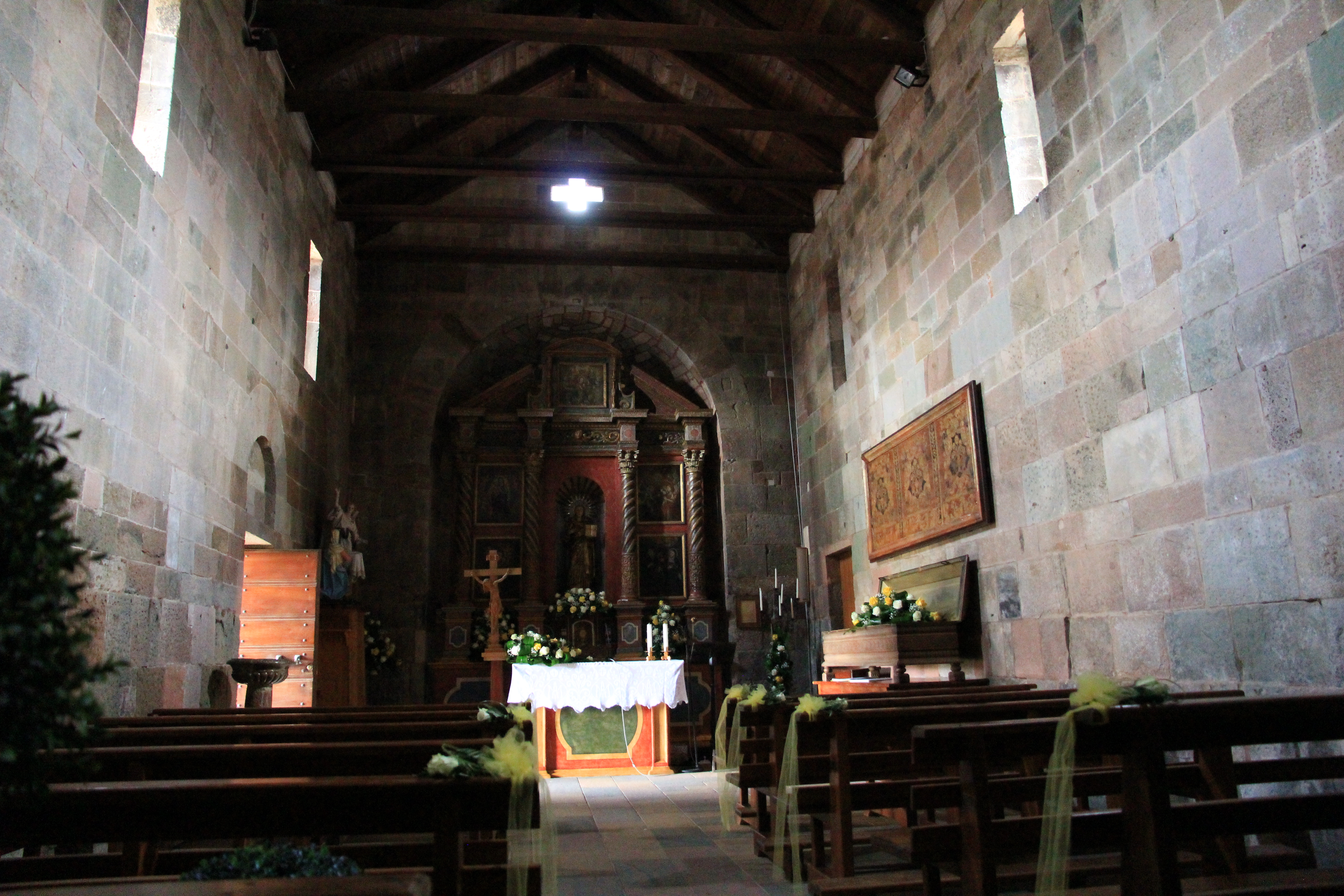 Oschiri - Santuario di Nostra Signora di Castro